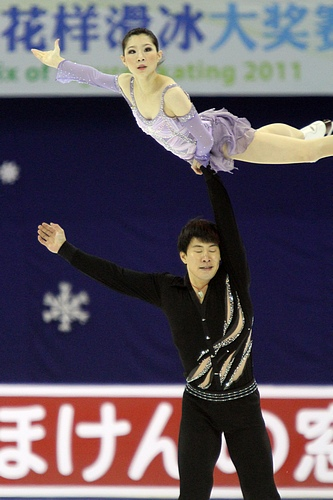 Чжан Дань и Чжан Хао на Кубке Китая 2011